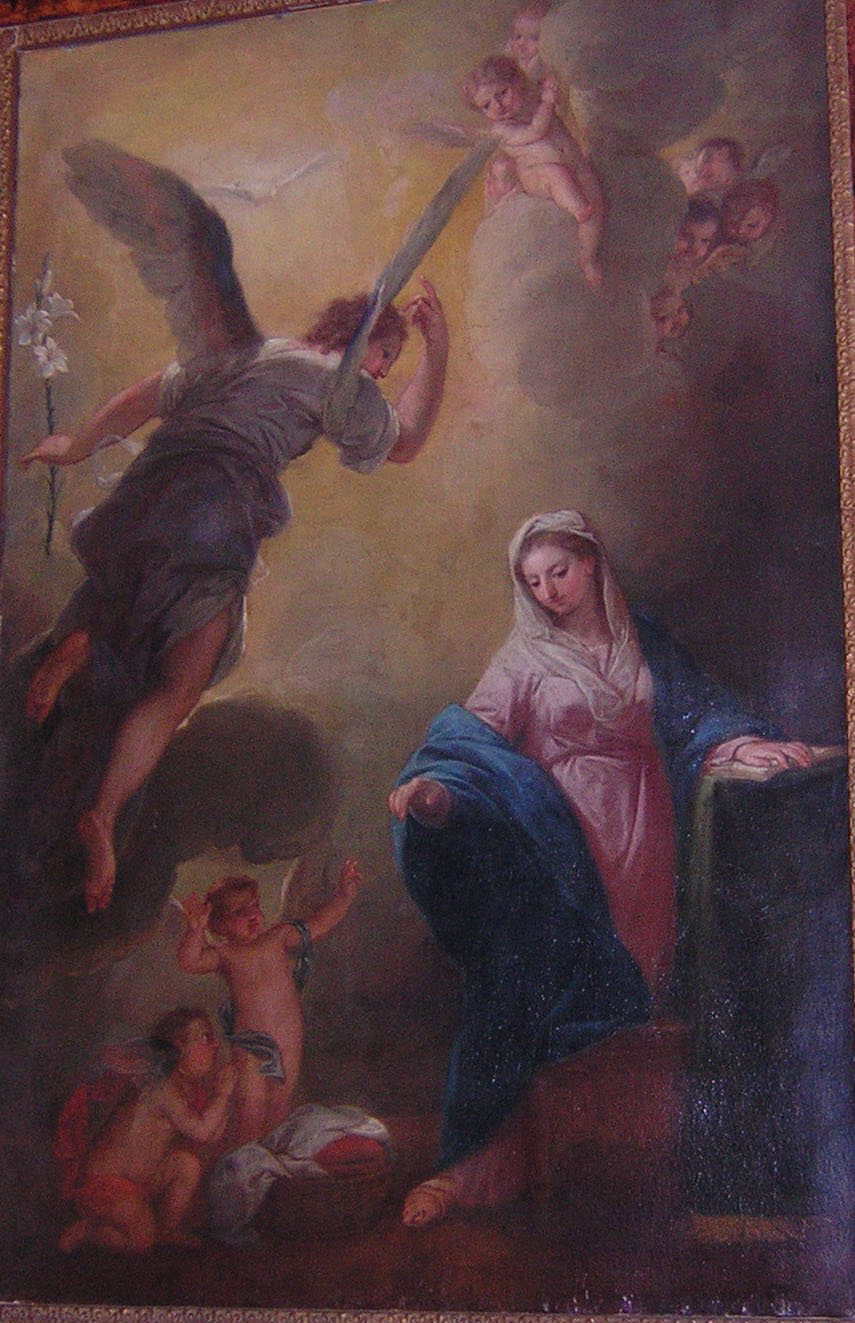 Pala altare annunciata